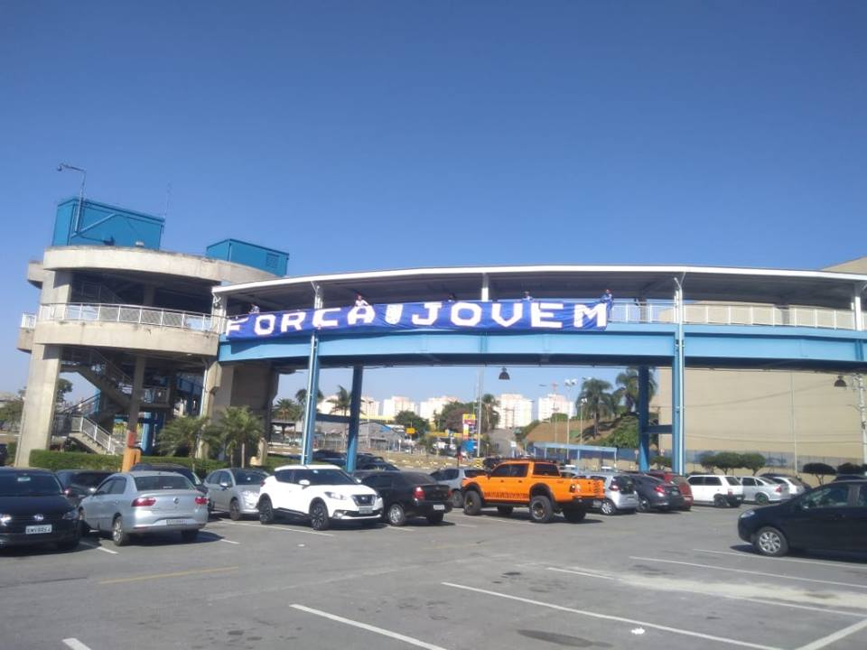 Faixa FJAD Antifa